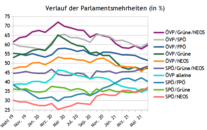 Parlamentsmehrheiten AT